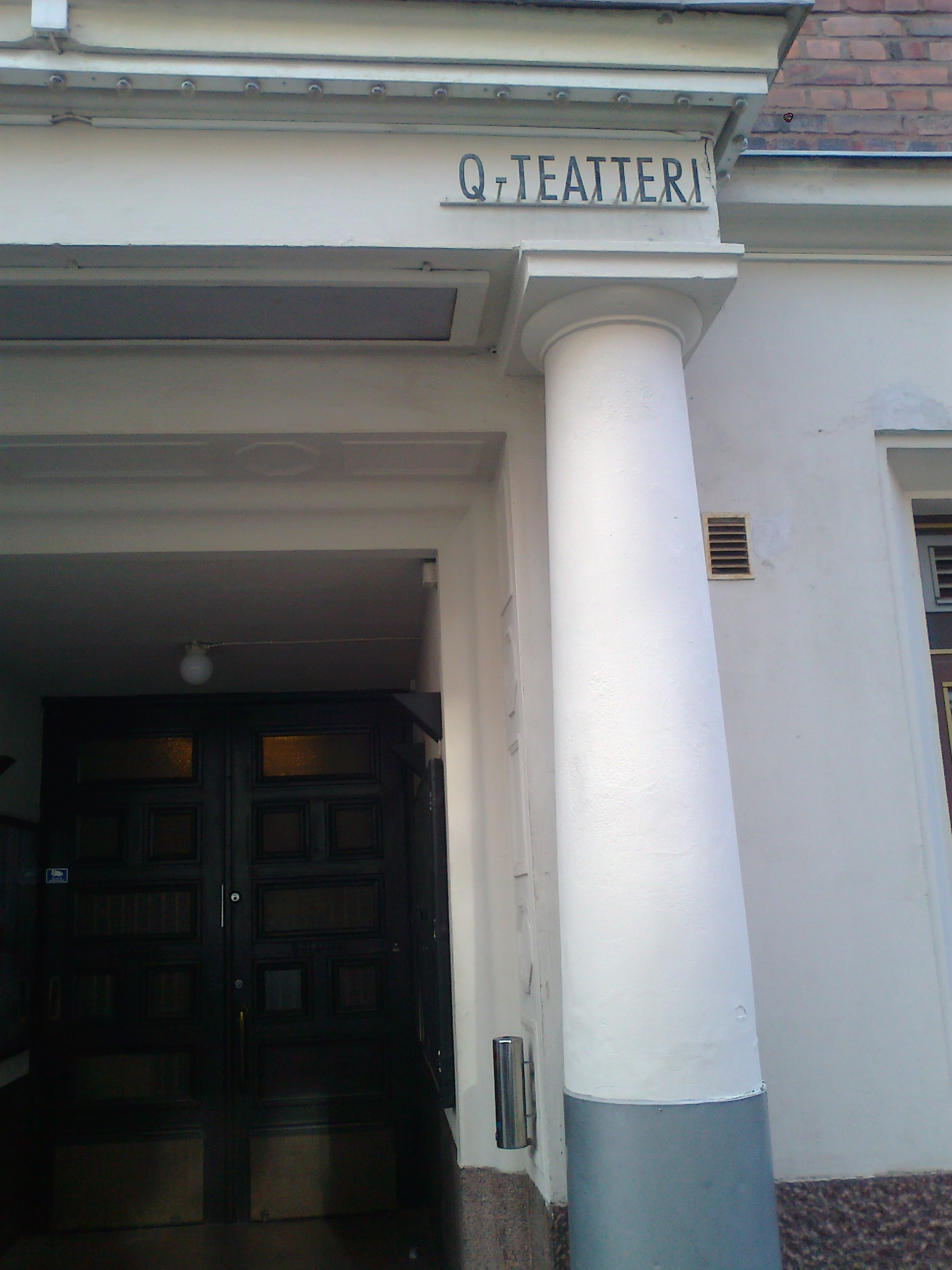 Q-teatterin sisäänkäyntiä Helsingin Tunturikadulla.